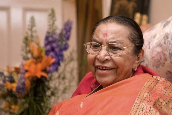 Шрі Матаджі